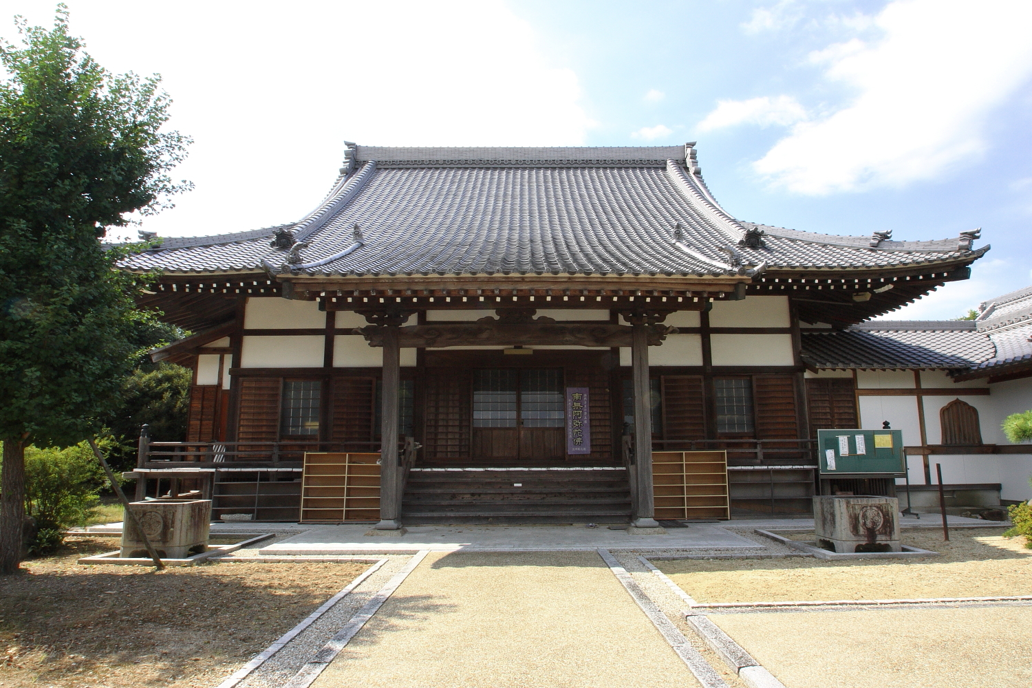 大乗寺本堂（安城市安城町、2009年（平成21年）8月）